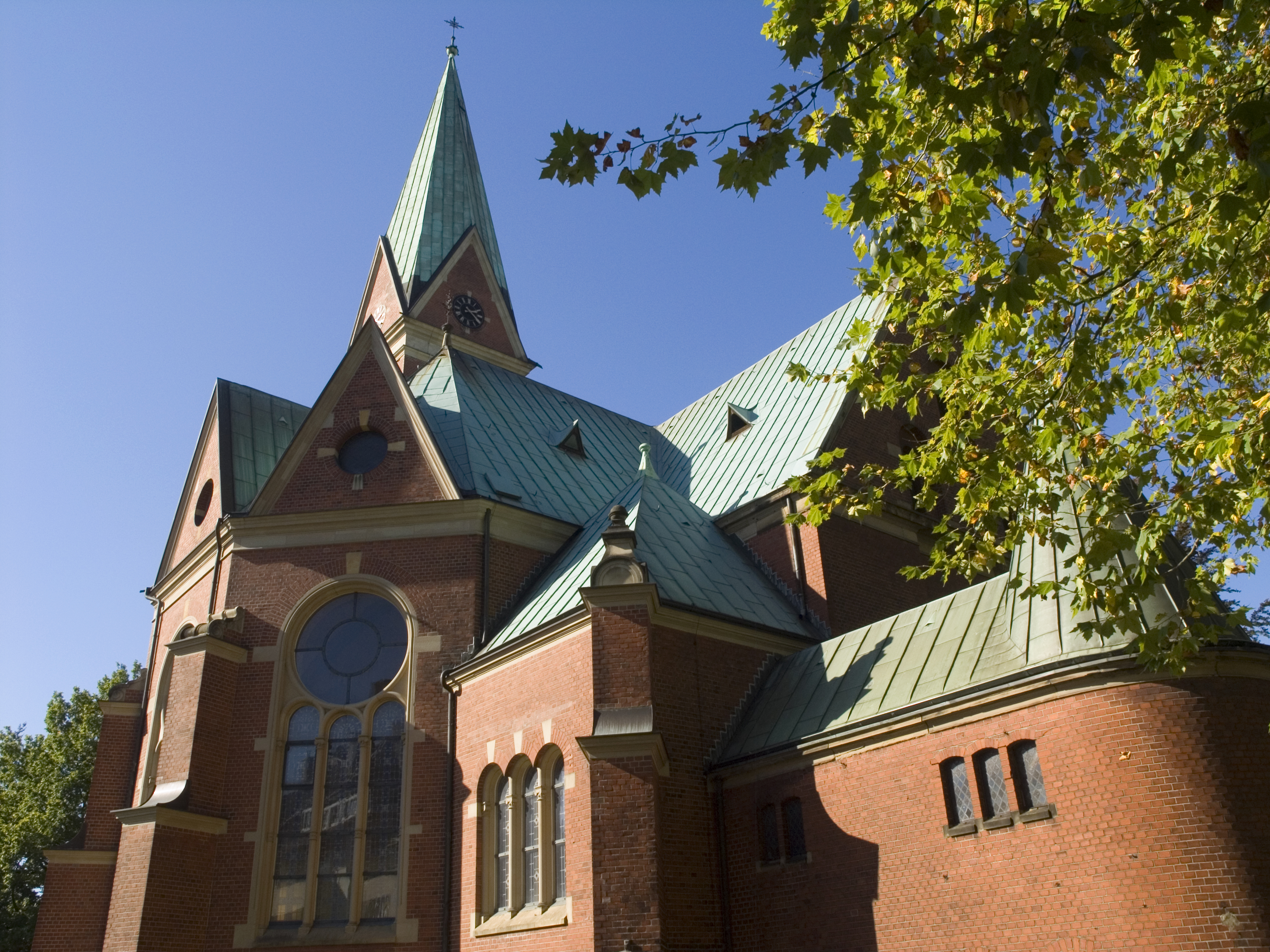 Северный Рейн-Вестфалия, Эссен, Верден - Евангелическая церковь